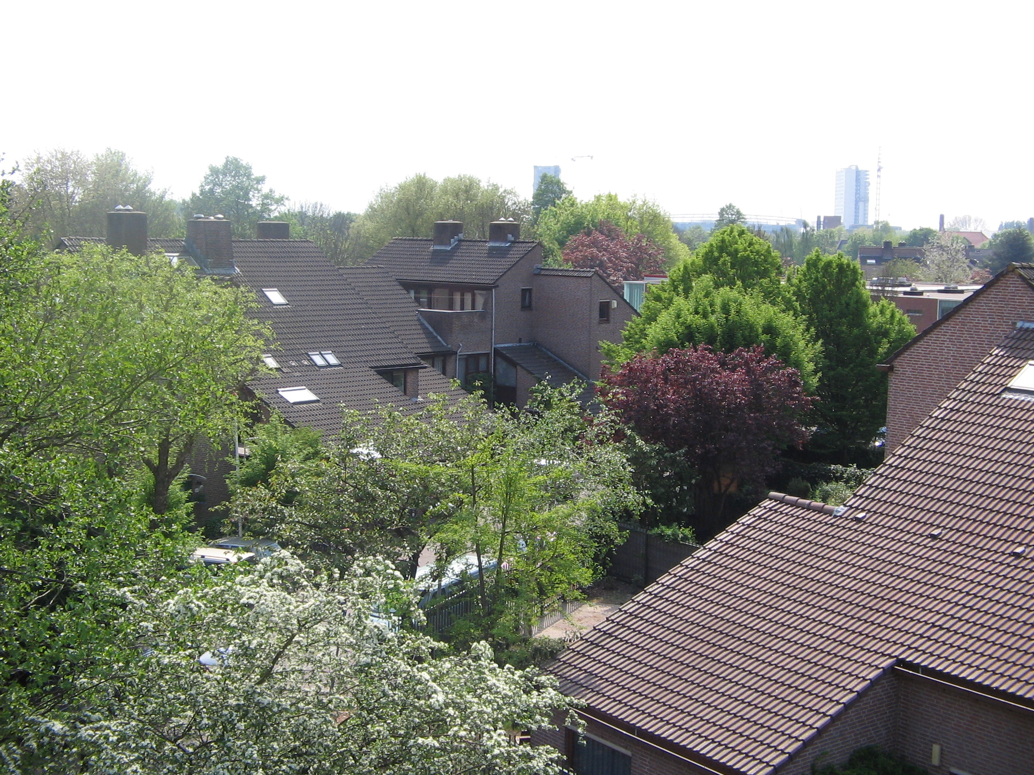 Rijnsweerd, Dutch neighbourhood